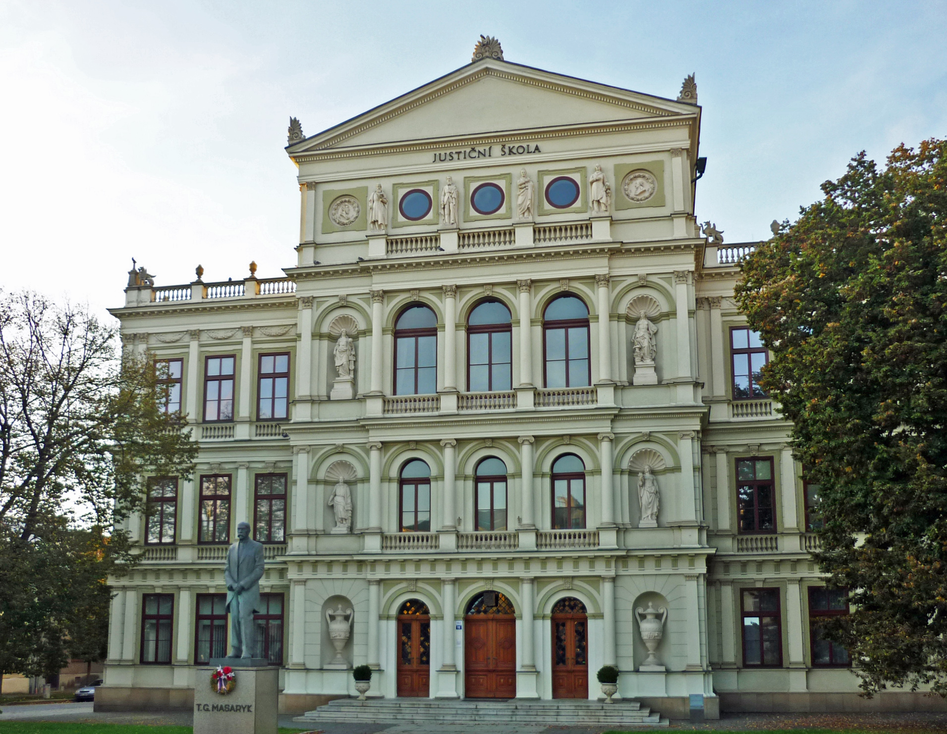 Justizschule in Kremsier (Kroměříž) in Mähren